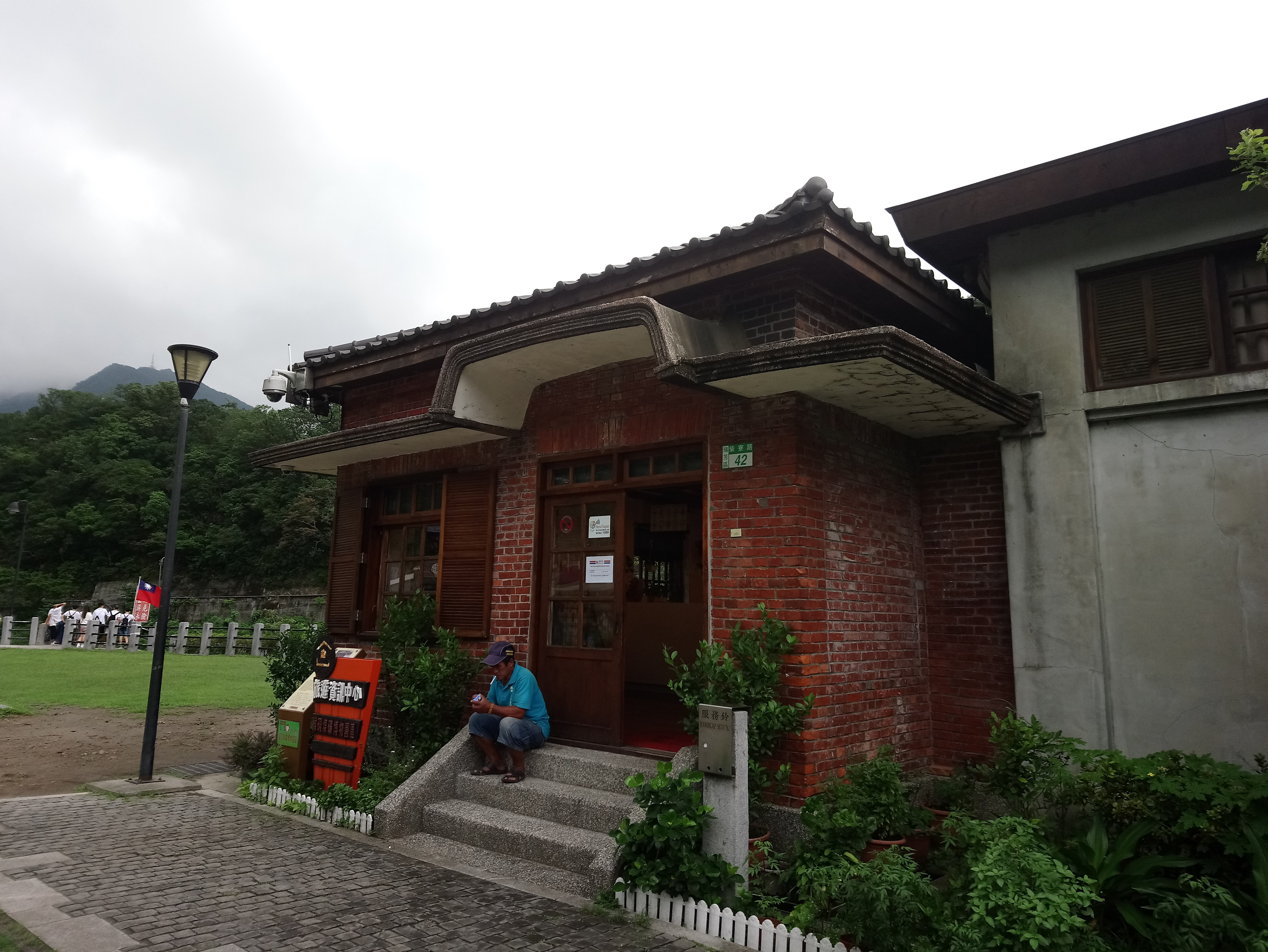 瑞三煤礦整煤場辦事處,新北市瑞芳區猴硐地區光復里